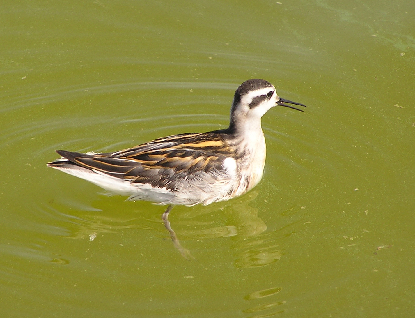 Круглоносый плавунчик Phalaropus lobatus (Linnaeus, 1758), сфотографировано на Белосарайской косе в конце августа 2007